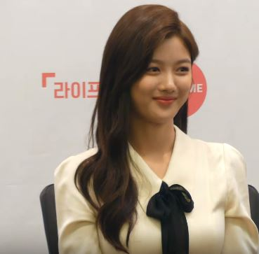 30일 오후 서울시 종로구 당주동 포시즌스 호텔 서울에서 라이프타임 채널의 '하프 홀리데이' 제작발표회가 열려 배우 김유정이 기자 질의 응답 시간을 갖고 있다.